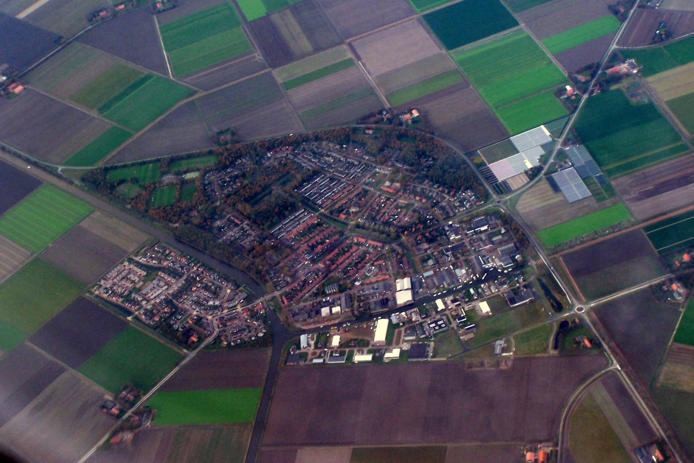 Marknesse Markenesse